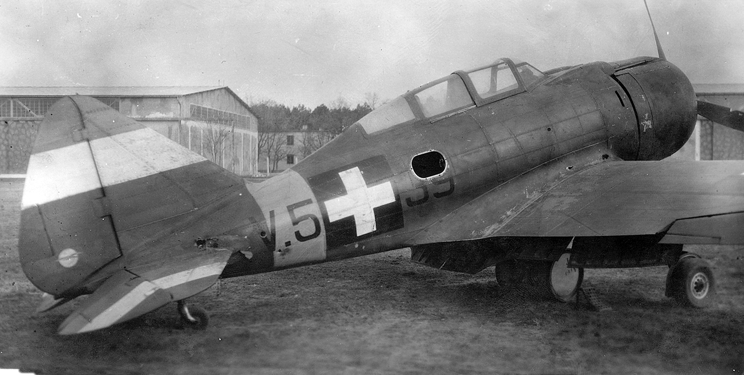 repülőtér, 1944. április 13. Kass Ferenc őrmester légiharcban megsérült MÁVAG Héja II. vadászrepülőgépe. Location: Hungary Tags: Royal Hungarian Air Force, MÁVAG-brand, Hungarian brand, airplane, fighter;plane, second World War Title: repülőtér, 1944. április 13. Kass Ferenc őrmester légiharcban megsérült MÁVAG Héja II. vadászrepülőgépe.